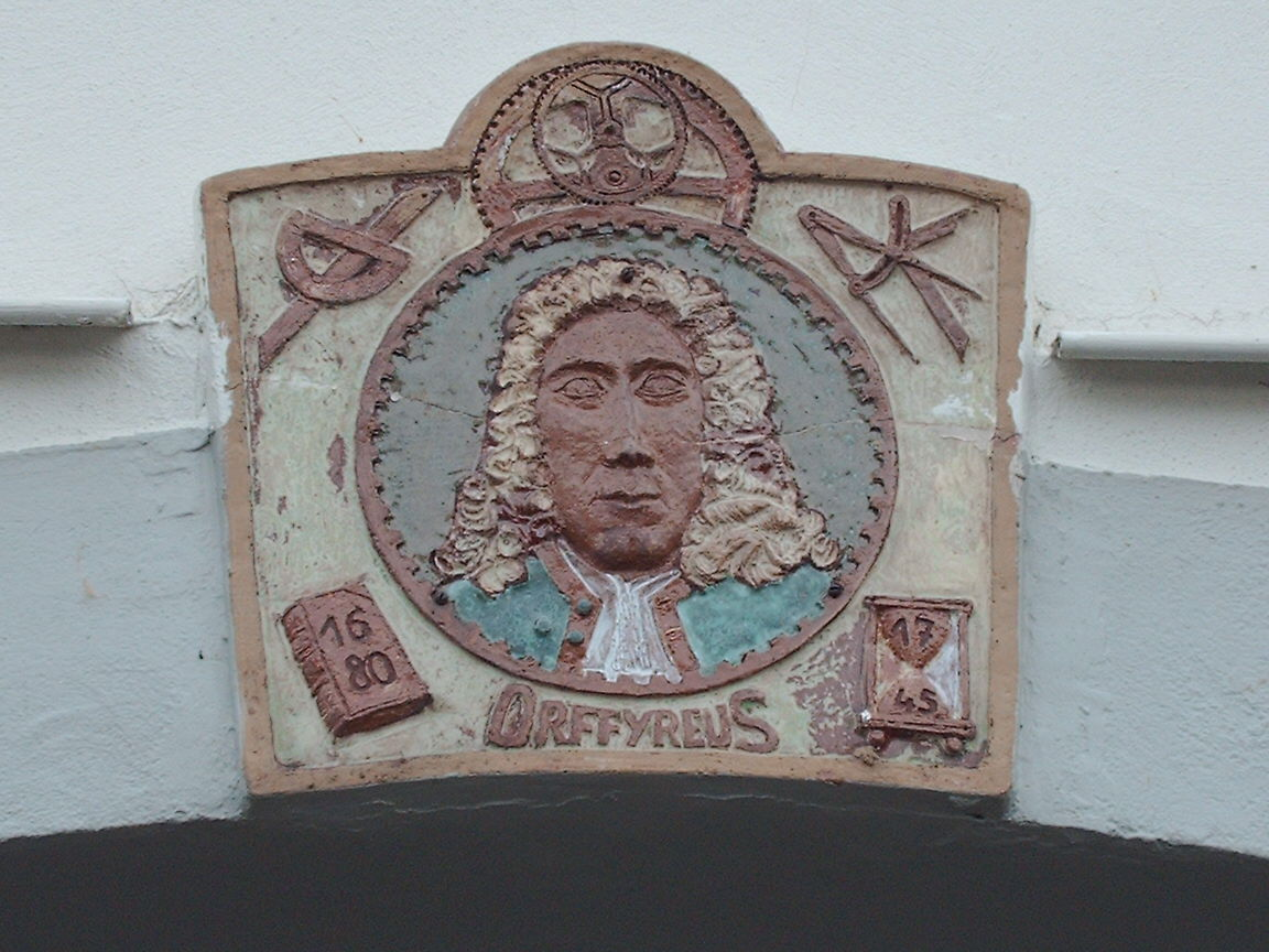 Johann Ernst Elias Bessler, Orffyreus, Schlusstein eines Türportals in Besslers Wohnort Karlshafen